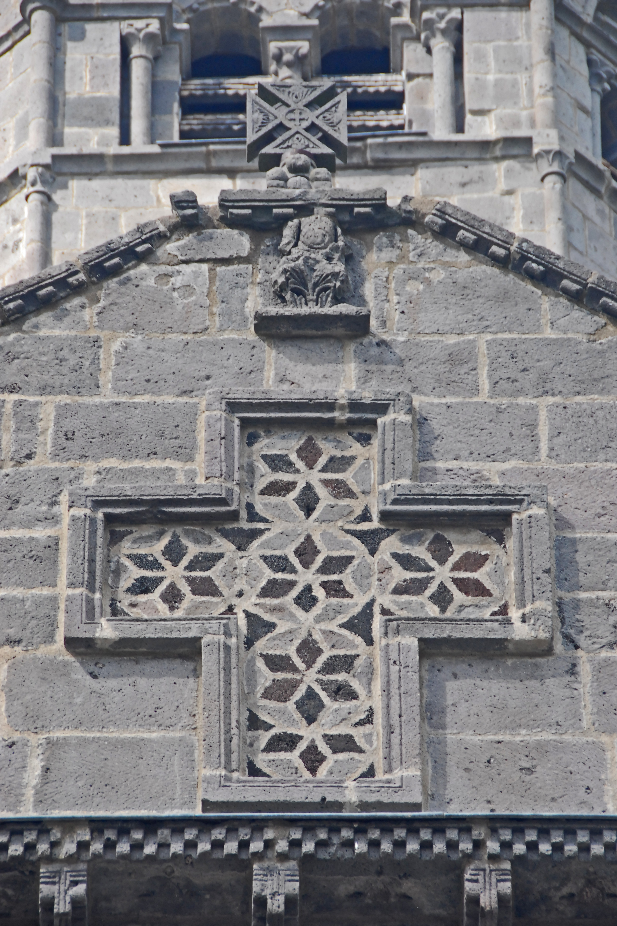 N.-D.d'Orcival, südl. Querhausarm, Giebel